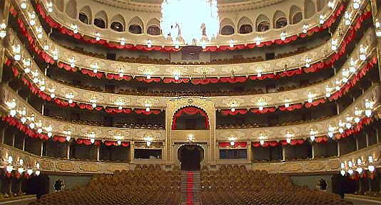 Opera House, Tbilisi, Georgia (Teatr opery i baleta im. Zakaria Paliashvili)